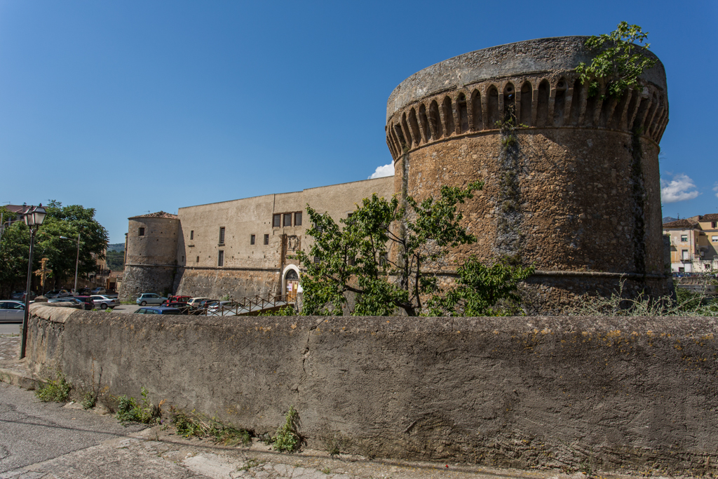 Castello Aragonese This is a photo of a monument which is part of cultural heritage of Italy.